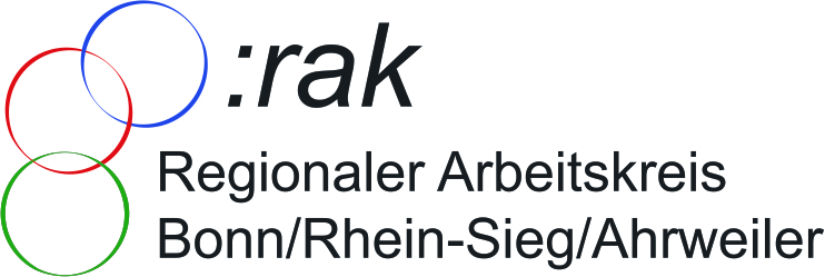 Logo des :rak aus dem Jahr 2020